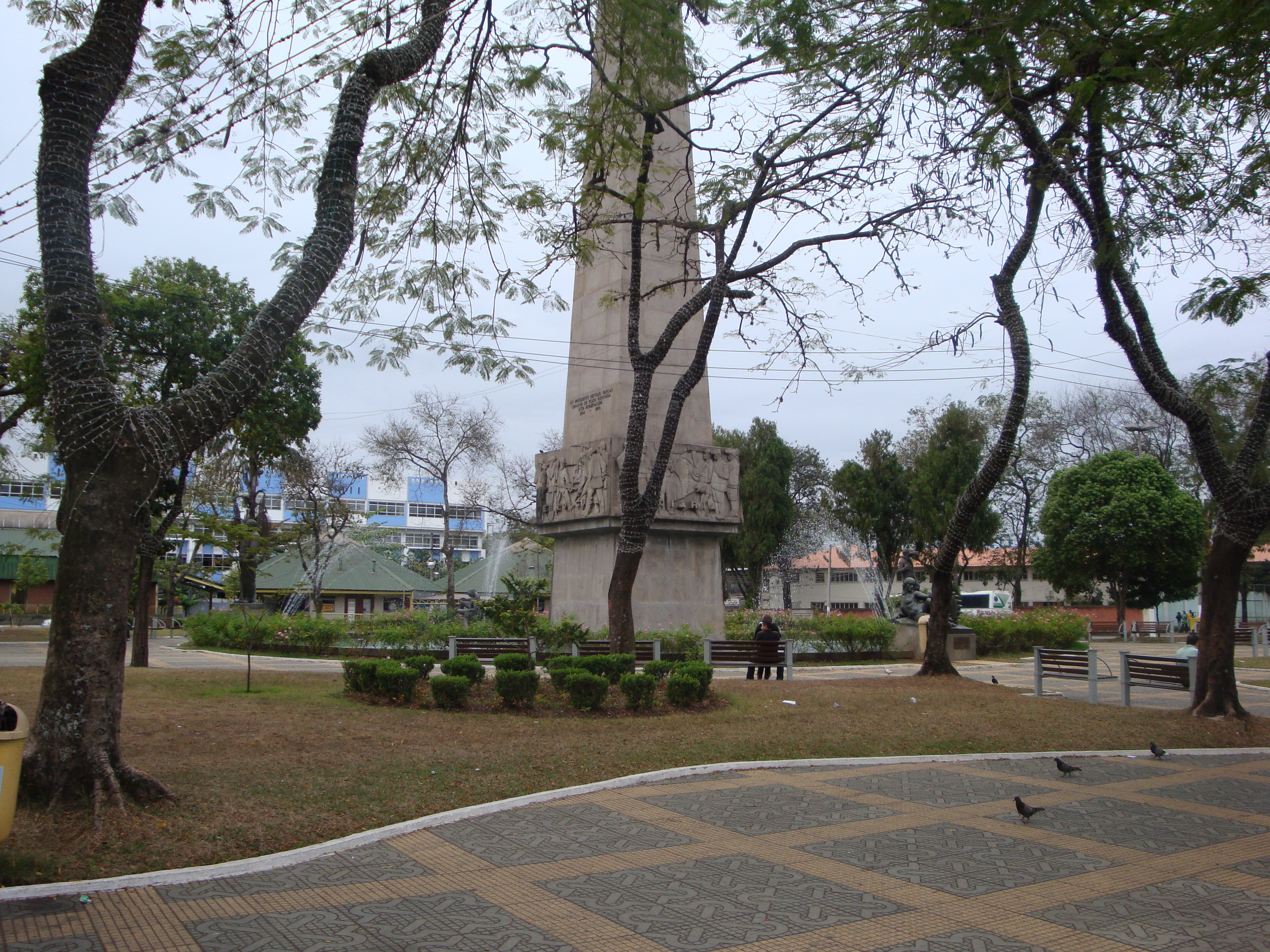 Praça Brasil - Volta Redonda - Brasil